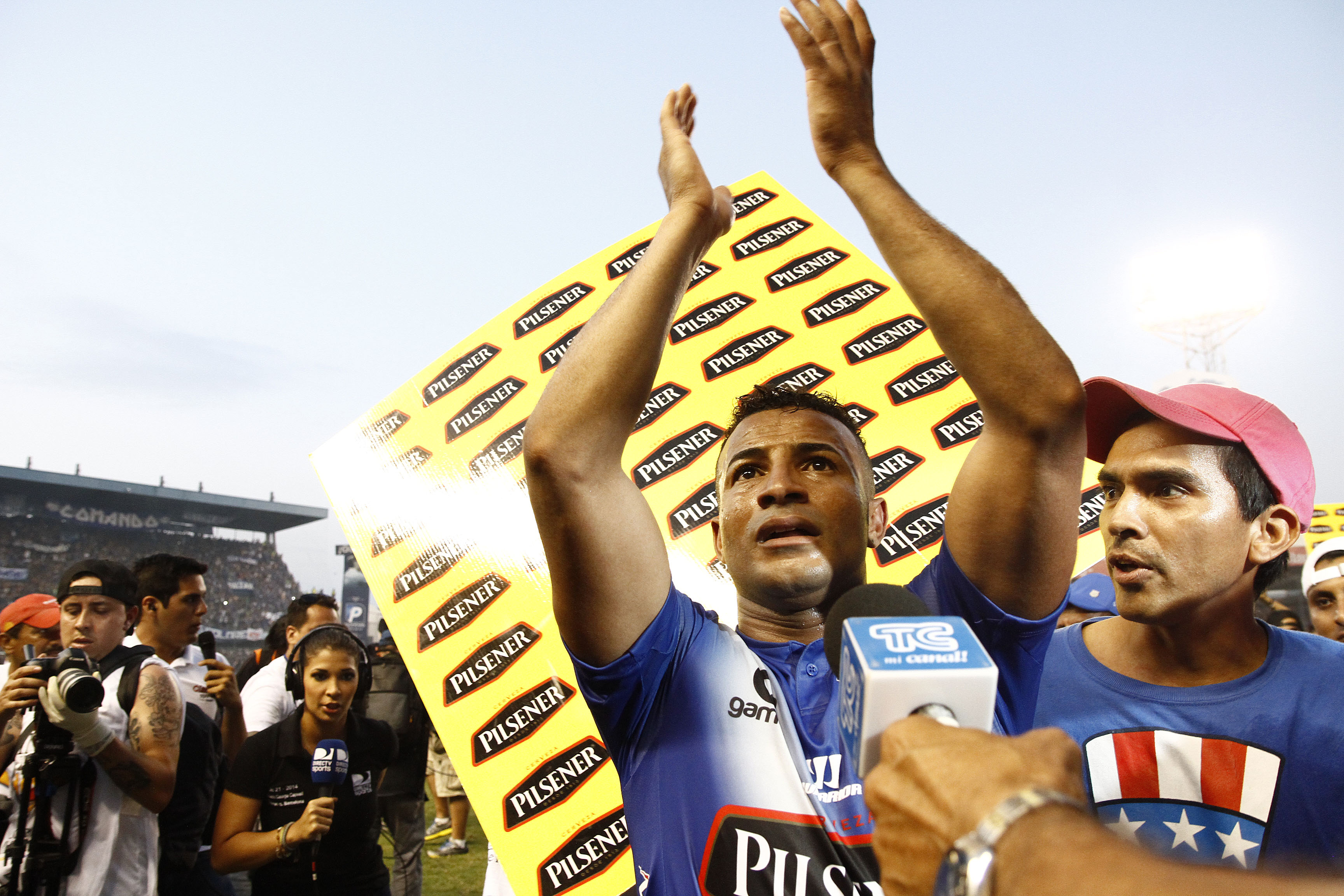 Guayaquil, Ecuador, 21 dic (ANDES).- El conjunto guayaquileño Emelec conquistó este domingo la edición 57 del campeonato ecuatoriano de fútbol. Foto: Micaela Ayala V./ANDES